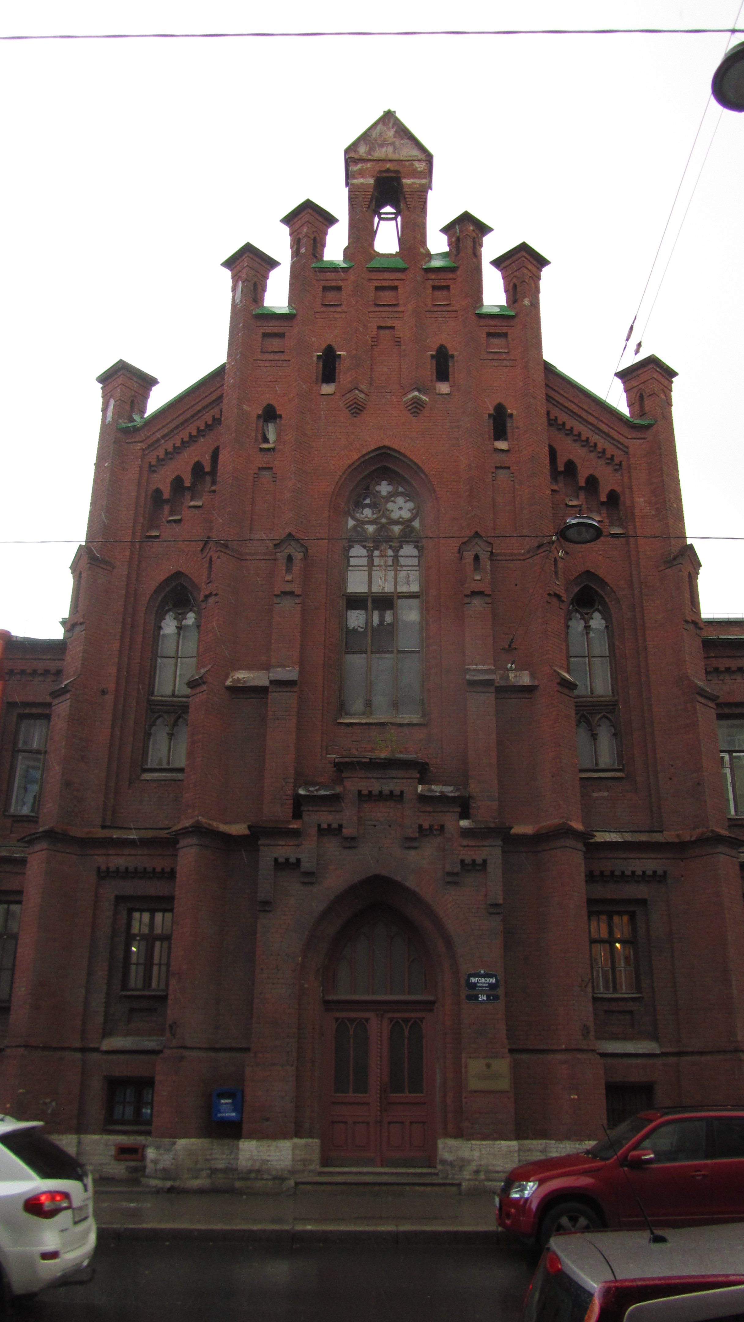 Евангелическая женская больница с евангелическо-лютеранской церковью (Санкт-Петербург и Лен.область, Санкт-Петербург, лиговский пр., 2-4, некрасова улица, 45)